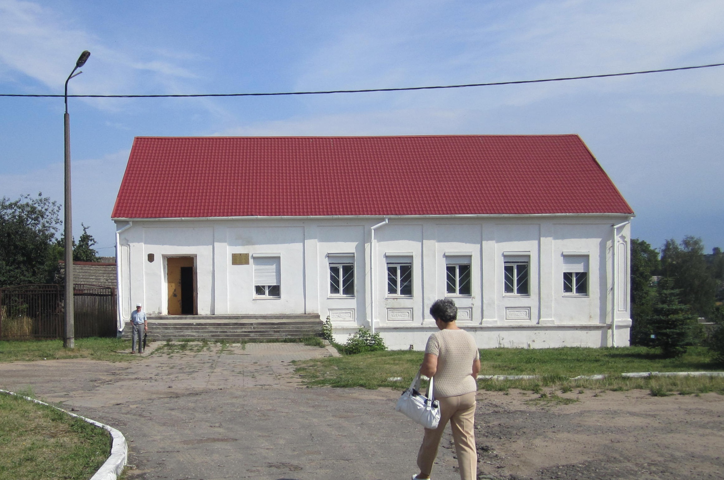 מבנה ישיבת וולזין